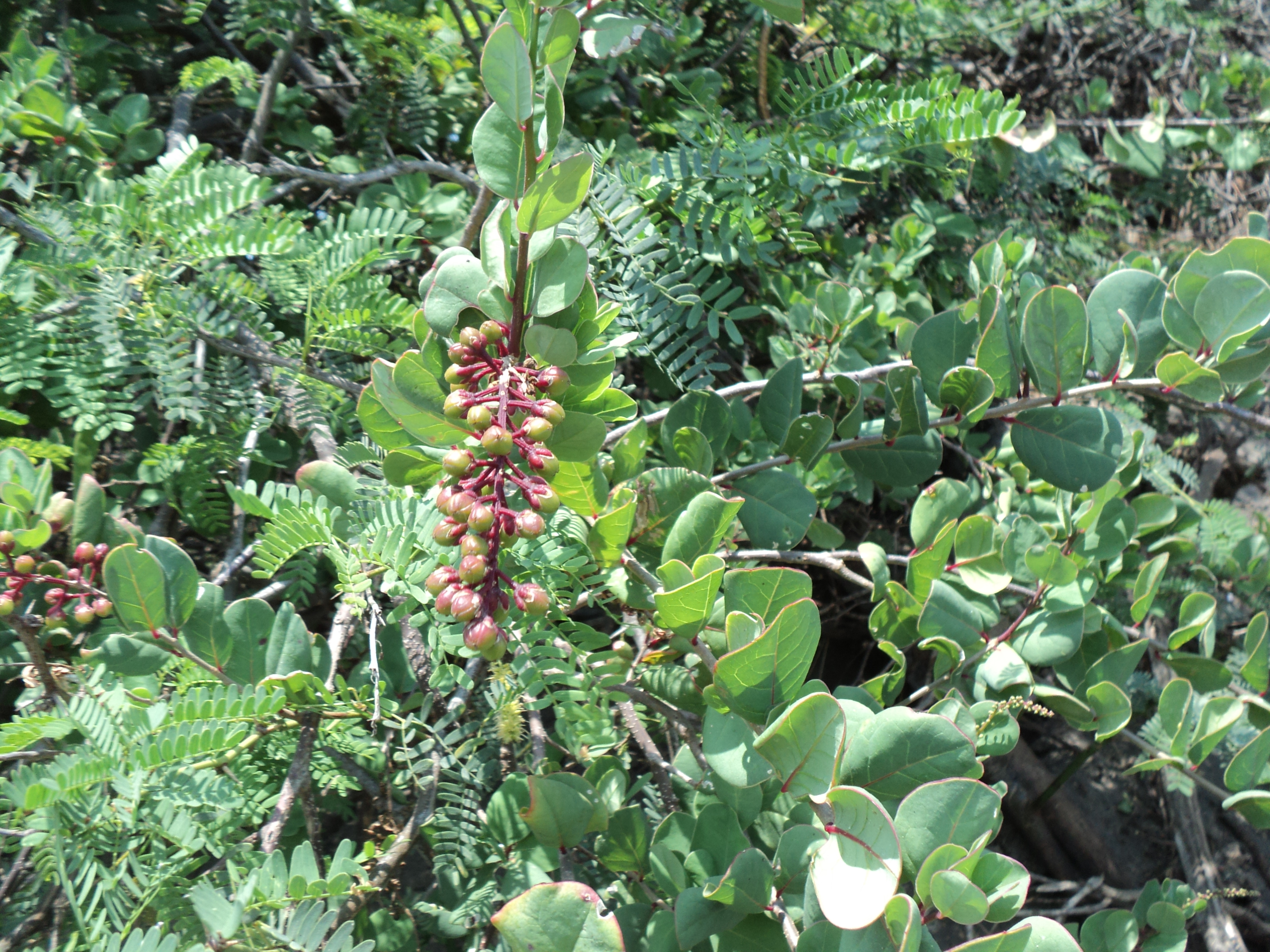 Stegnosperma Cubense, plana costera encontrada en dunas de Manzanillo, Colima.